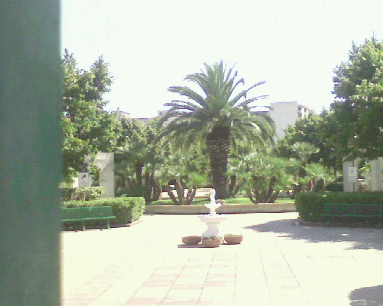 parco - Modugno (bari)-Italy